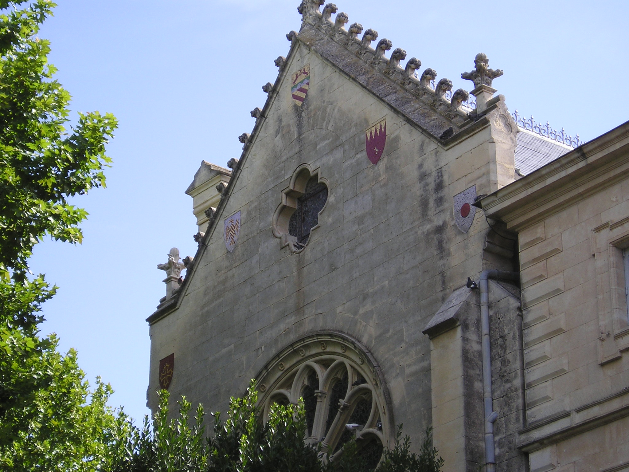 A Montpellier, dans le domaine de Grammont, le sommet de la façade de la chapelle.